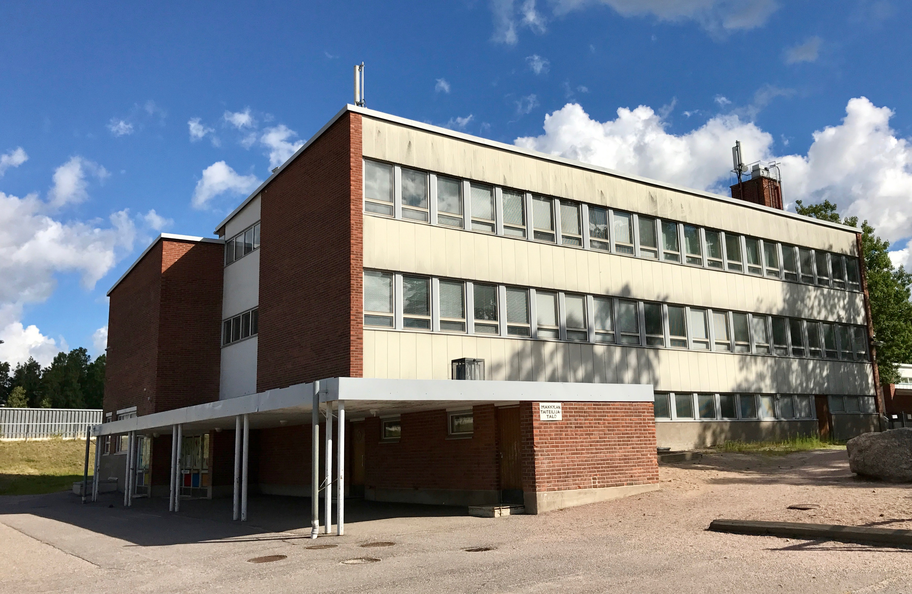 Mäkkylän taiteilijatalo Espoon Leppävaarassa.